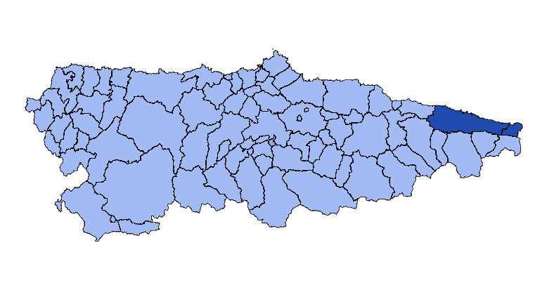 Concejos que forman la mancomunidad asturiana de los Concejos de Llanes y Ribadedeva